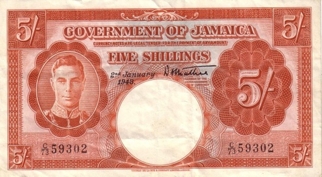 5 shillinges jegy előoldala.